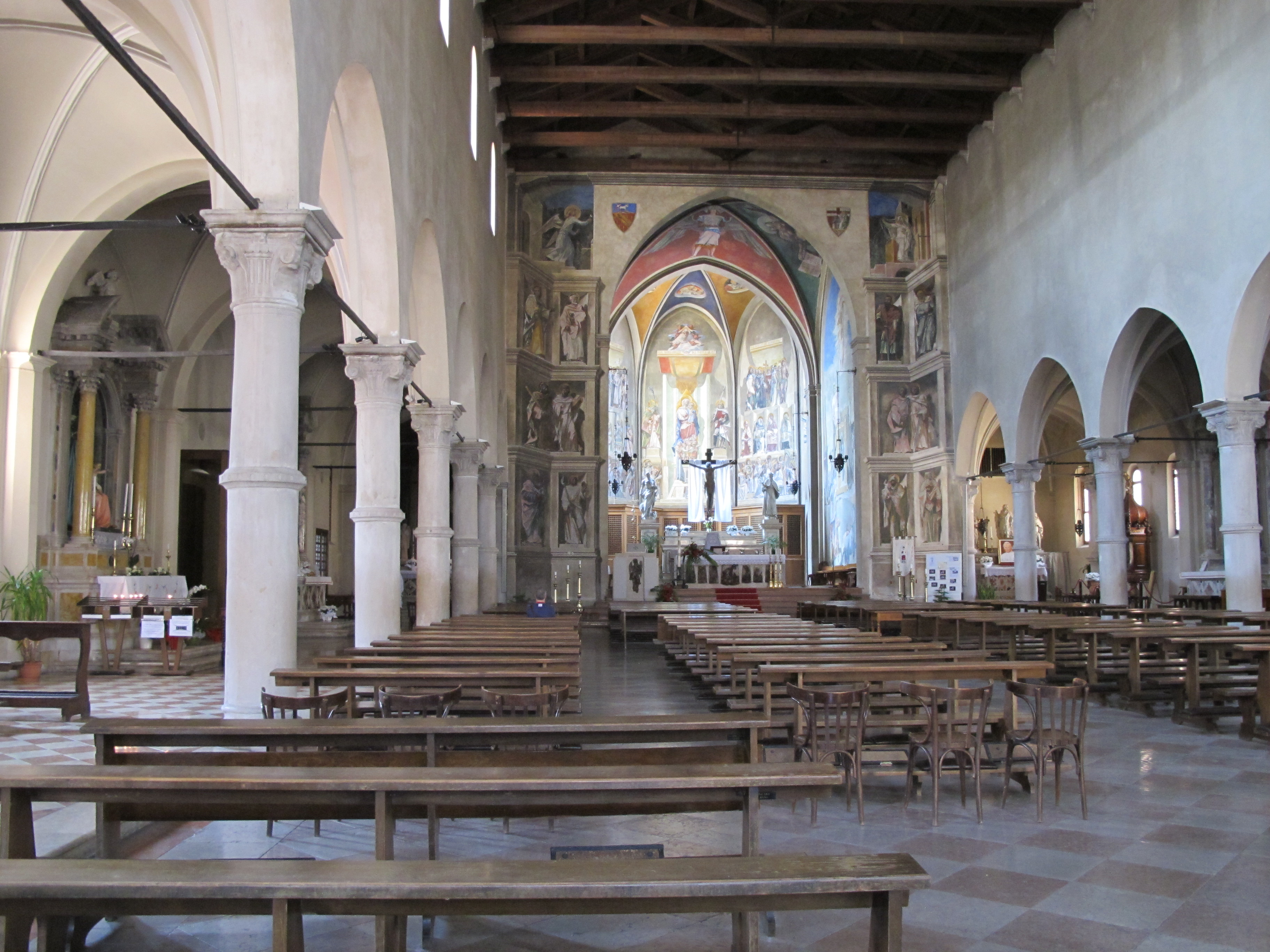 sacile 2011